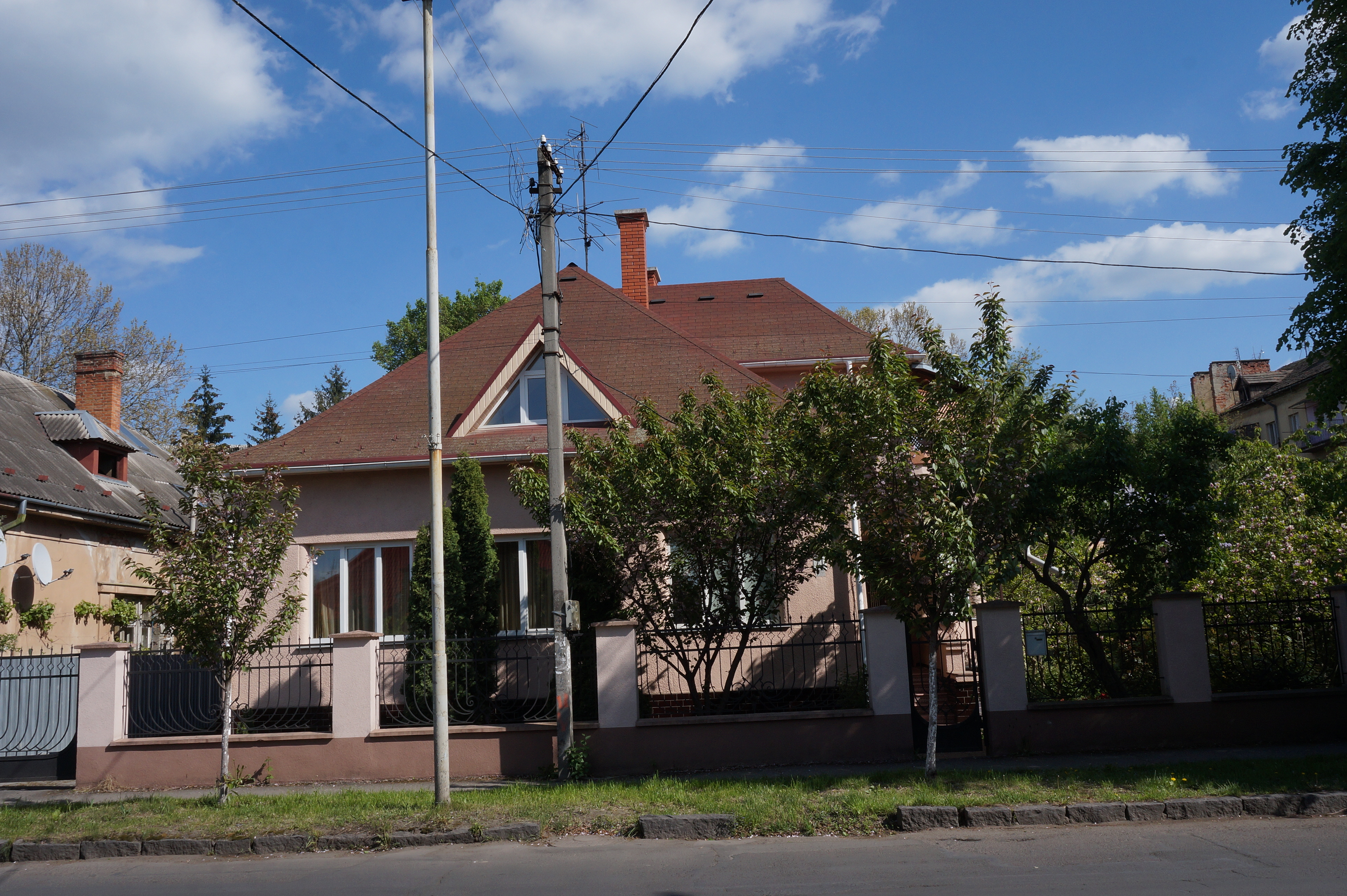 Будинок, в якому жив і працював видатний закарпатський культурний діяч П.В. Лінтур, Ужгород, вул. Митна, 21